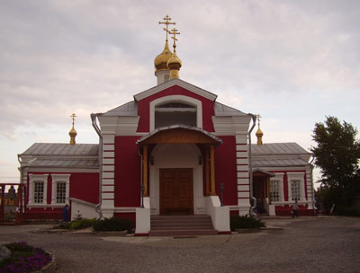 Церковь Параскевы Пятницы, Волгоград